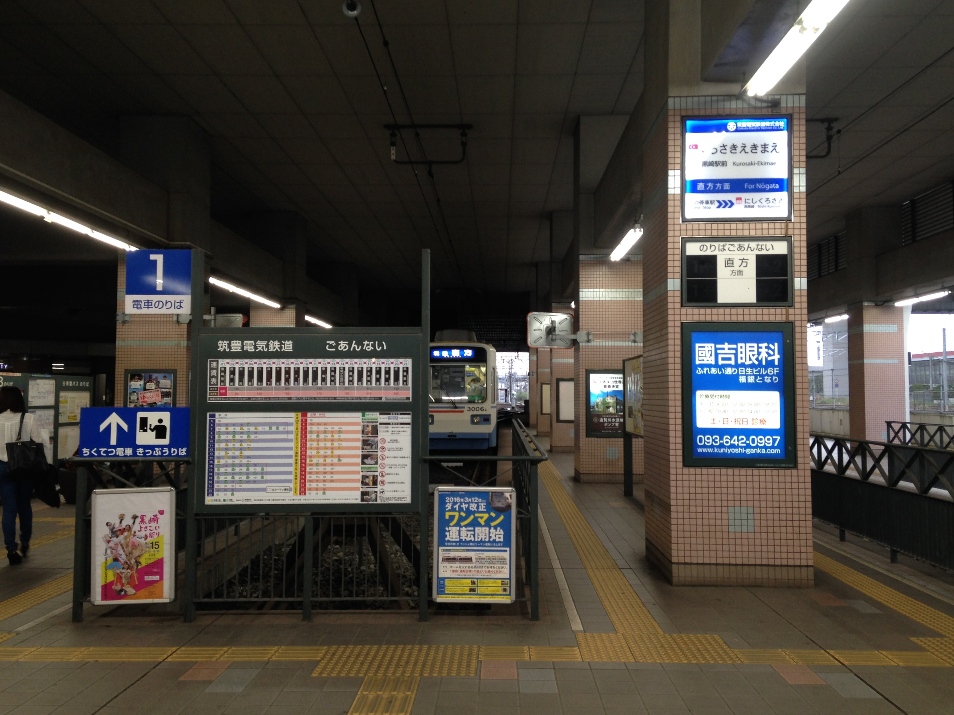 黒崎駅前駅の全景